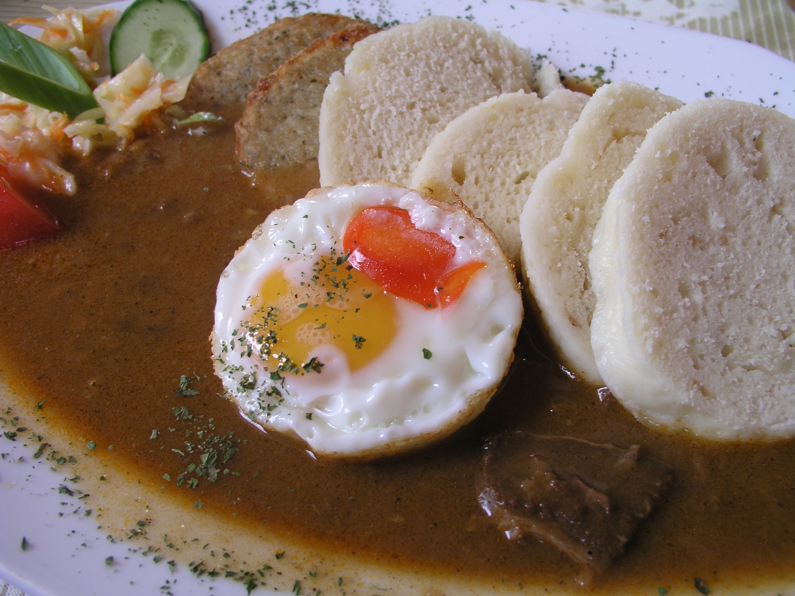 Plzeňský guláš s bramboráčky a houskovými knedlíky